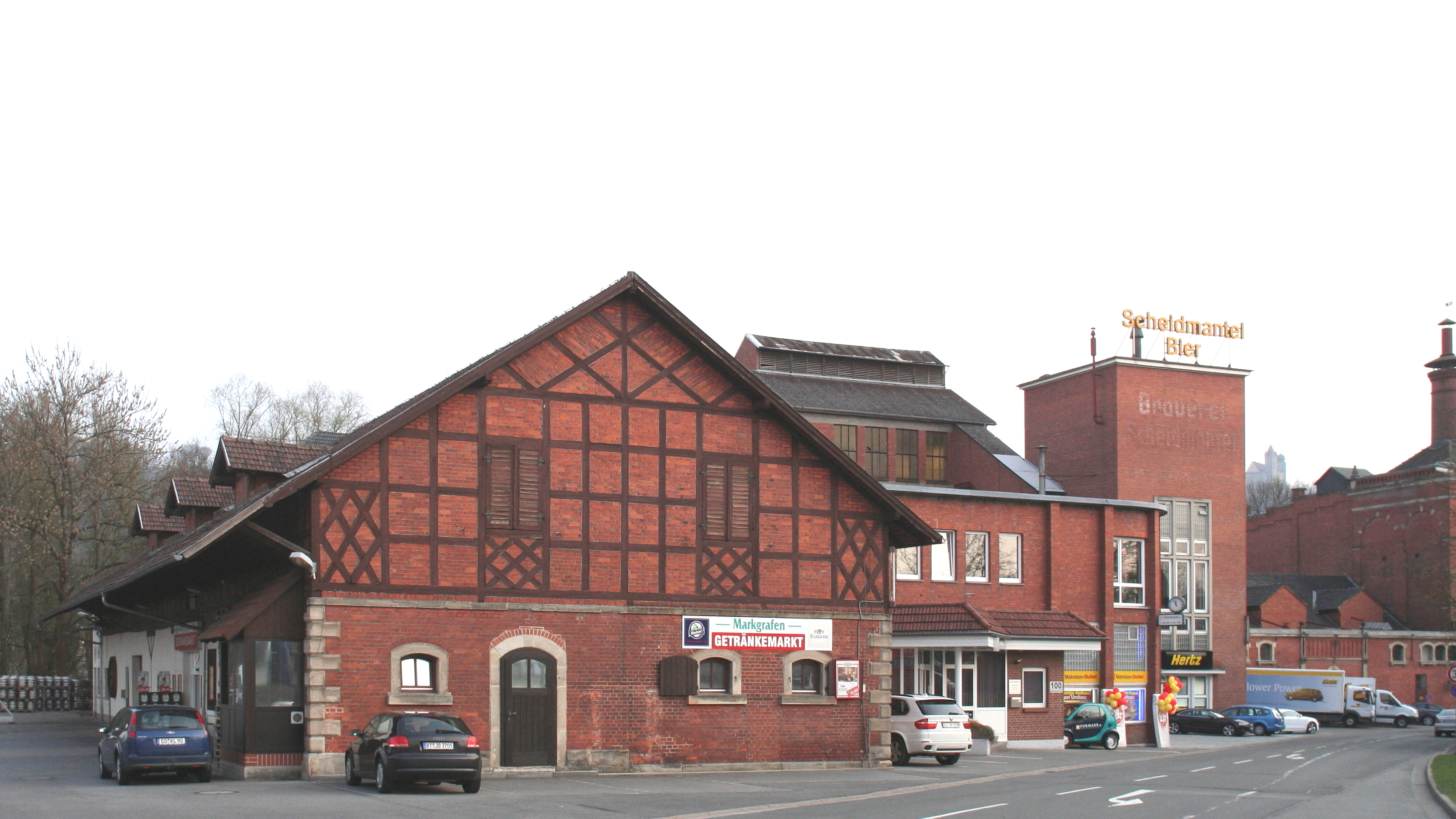 Brauerei Scheidmantel, Rosenauer Straße 98/100, Coburg-Cortendorf